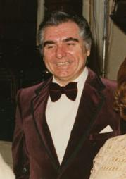 Geraint Evans